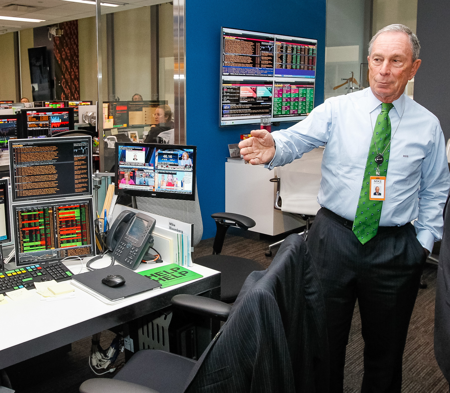 Michael Bloomberg em setembro de 2016